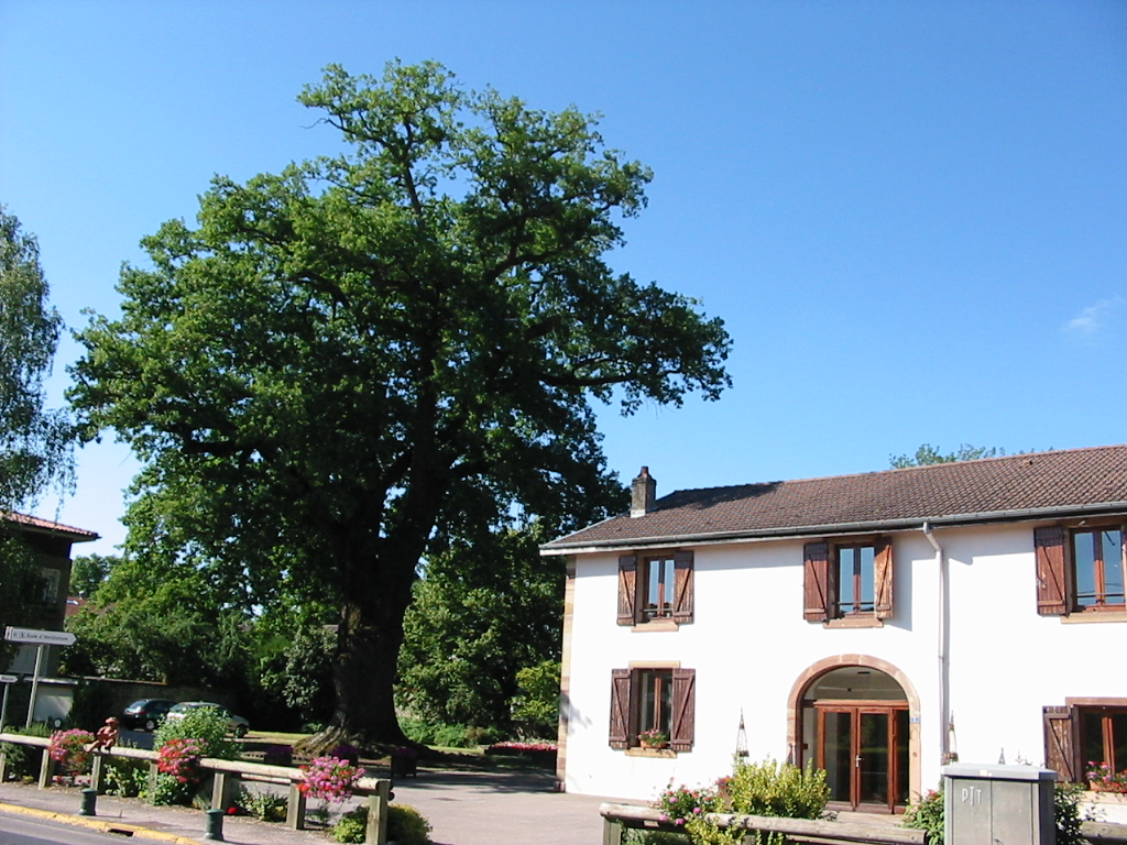 Roville-aux-Chênes Le vieux chêne (plus de 400 ans) et la mairie Commune du canton de Rambervillers (Vosges) Photo personnelle du 10 juillet 2006. Copyright © Christian Amet